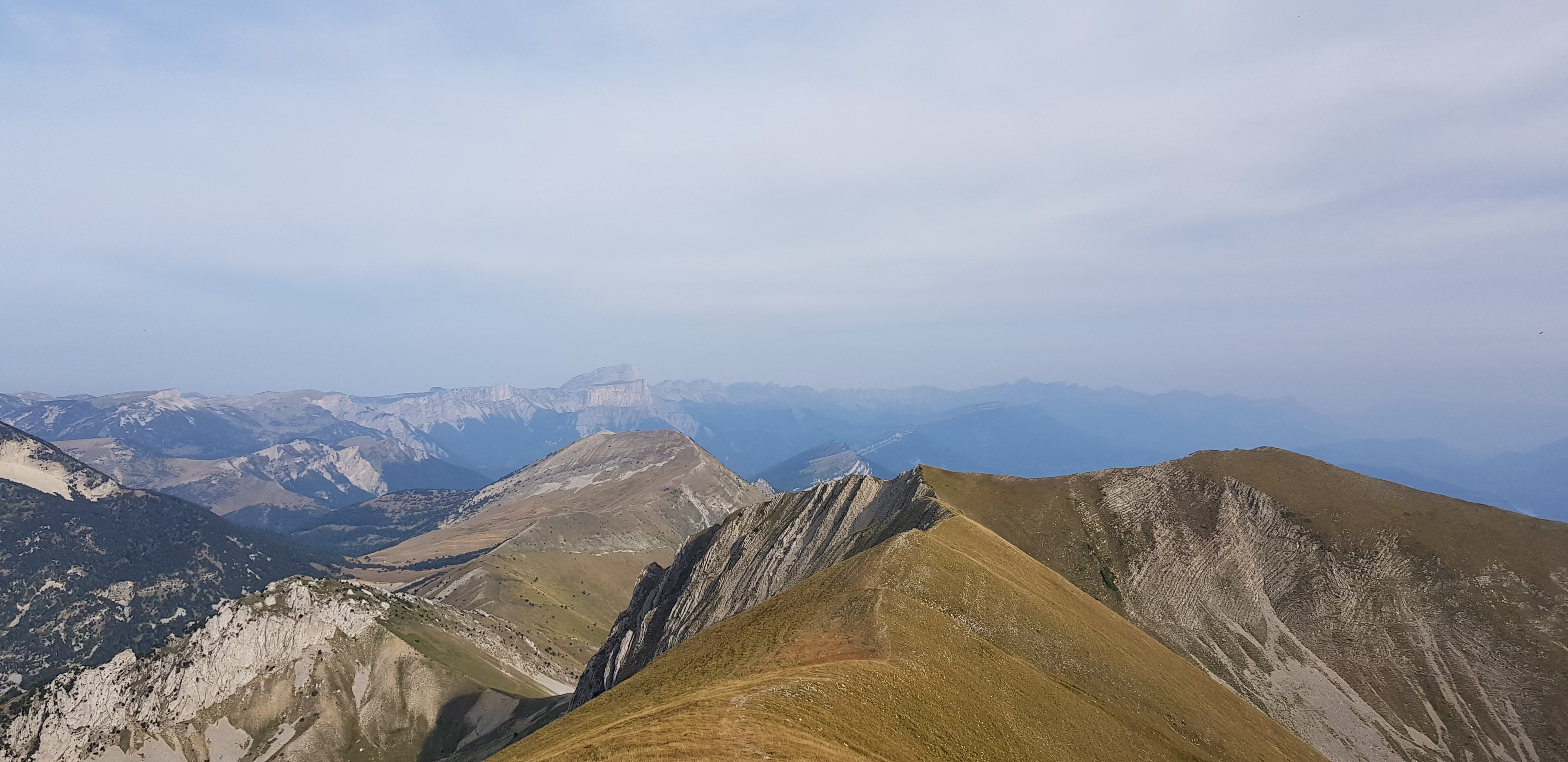 Looking north towards the Trièves area from the 2051 m high Jocou.